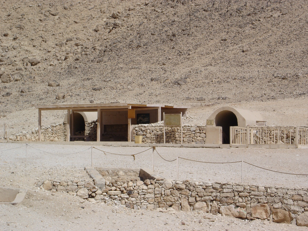 Nefertari sírja, Théba, nyugati part, QV66